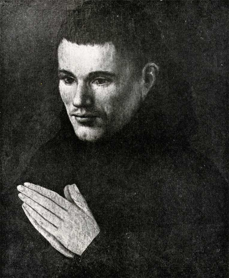 Portret van de franciscaan Gregorius Simpernel